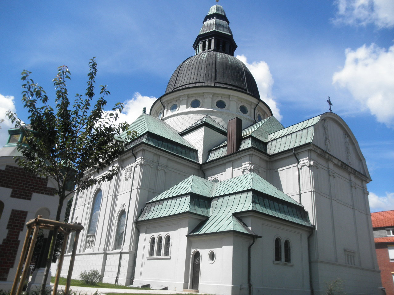 Kathedrale Emsland-Dom in Haren (Ems): die Südfassade unter blauem Sommerhimmel